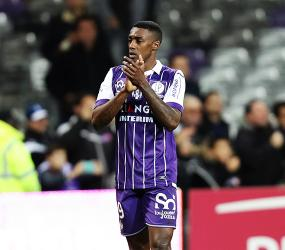 Somalia applaudissements montpellier-Toulouse FC en 2016.